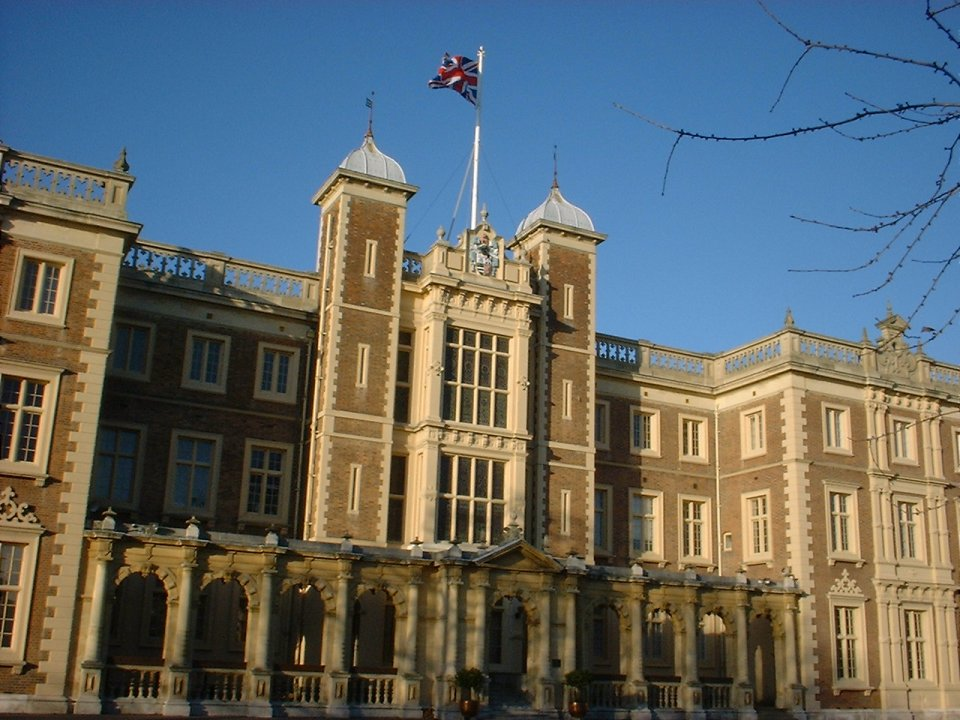 Kneller Hall in February 2006, taken by J. Miall